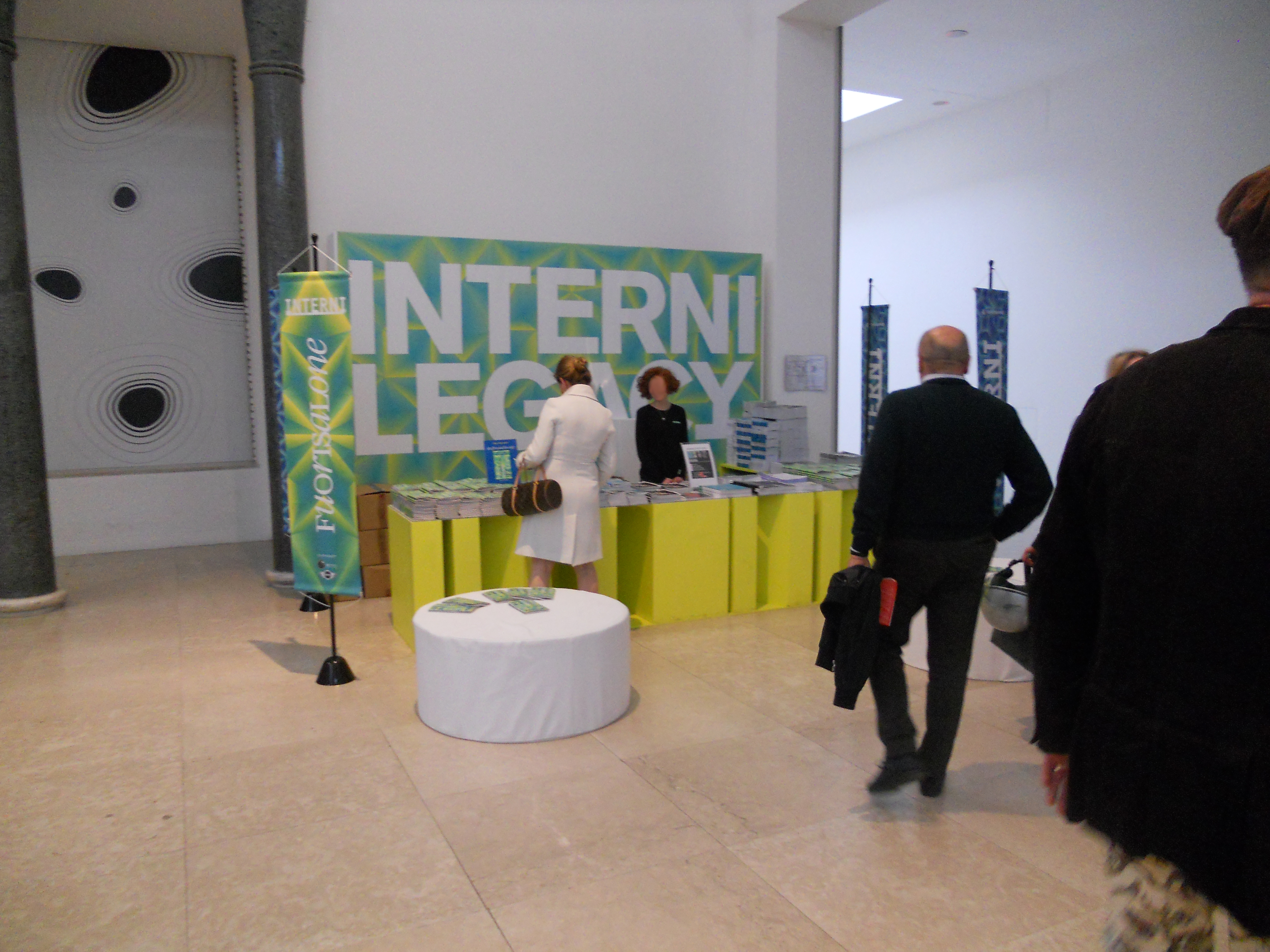 Punto informativo e orientativo della Interni per il Fuorisalone di Milano Foto scattata durante il Triennale Design Week 2012 ( evento correlato del Fuorisalone)